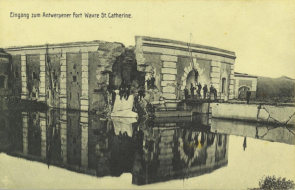 Разрушения в горжевом капонире антверпенского форта Вавр-С.Катрин